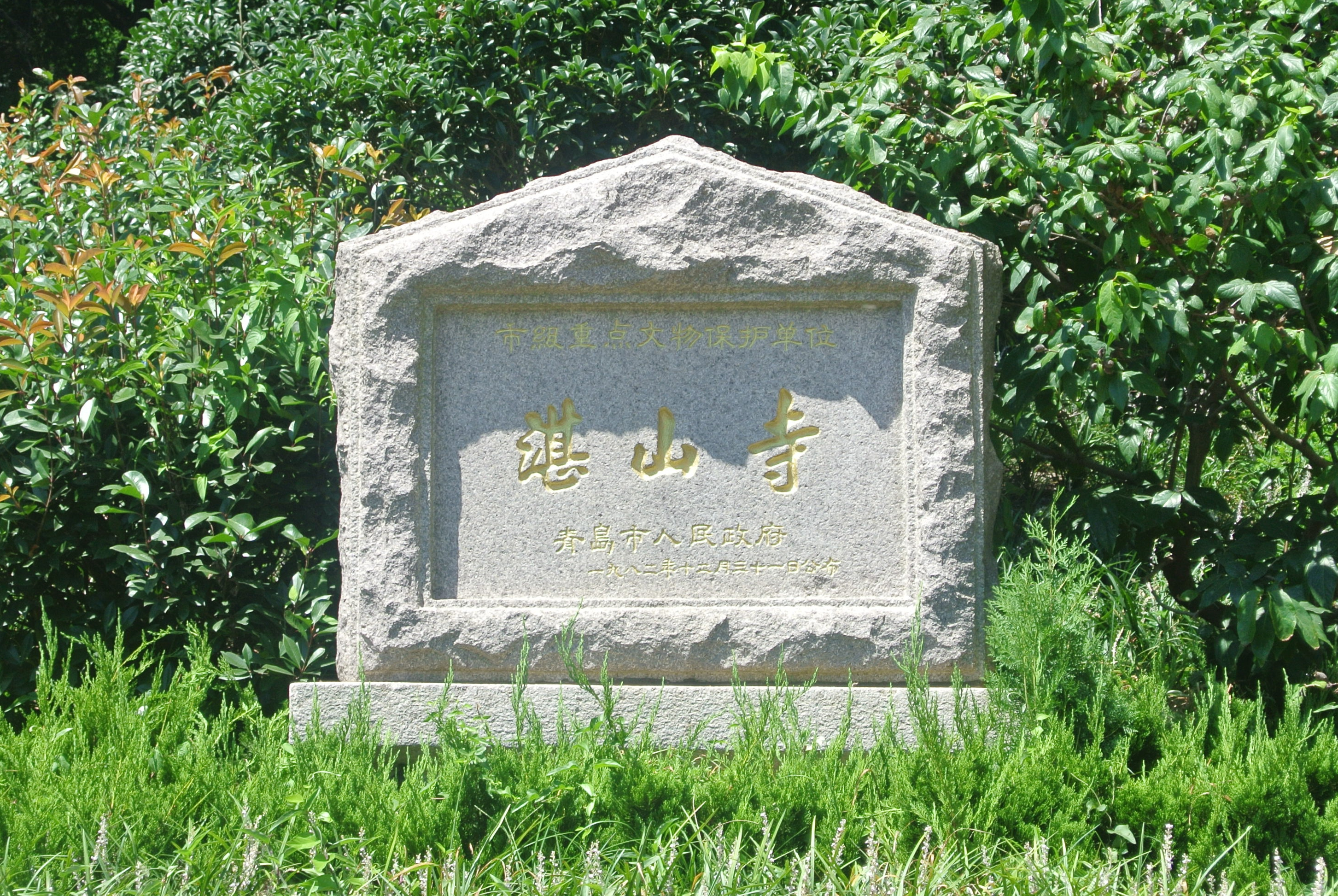 青岛湛山寺文保碑